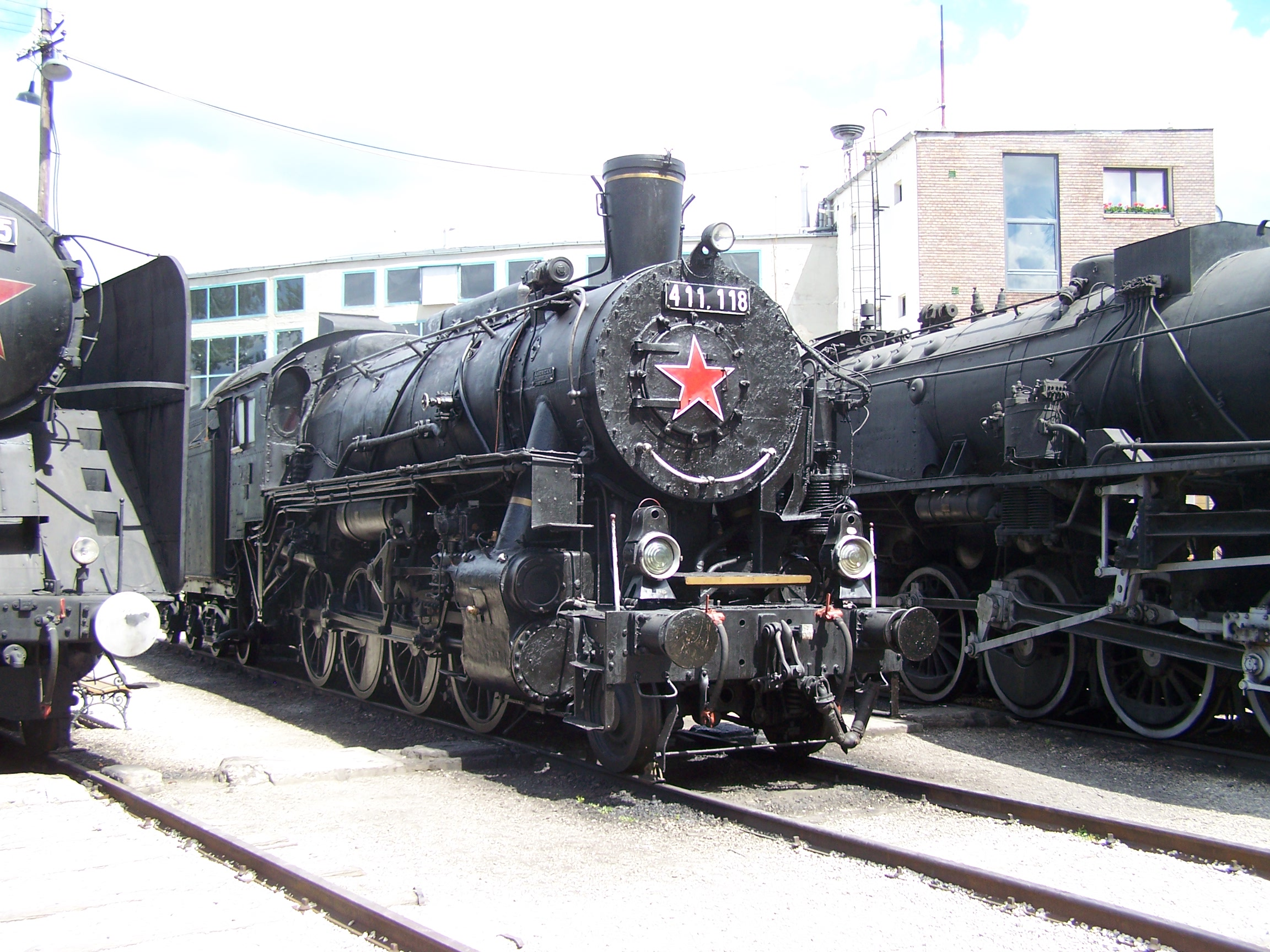 MÁV 411 a Füsti vasúttörténeti parkban